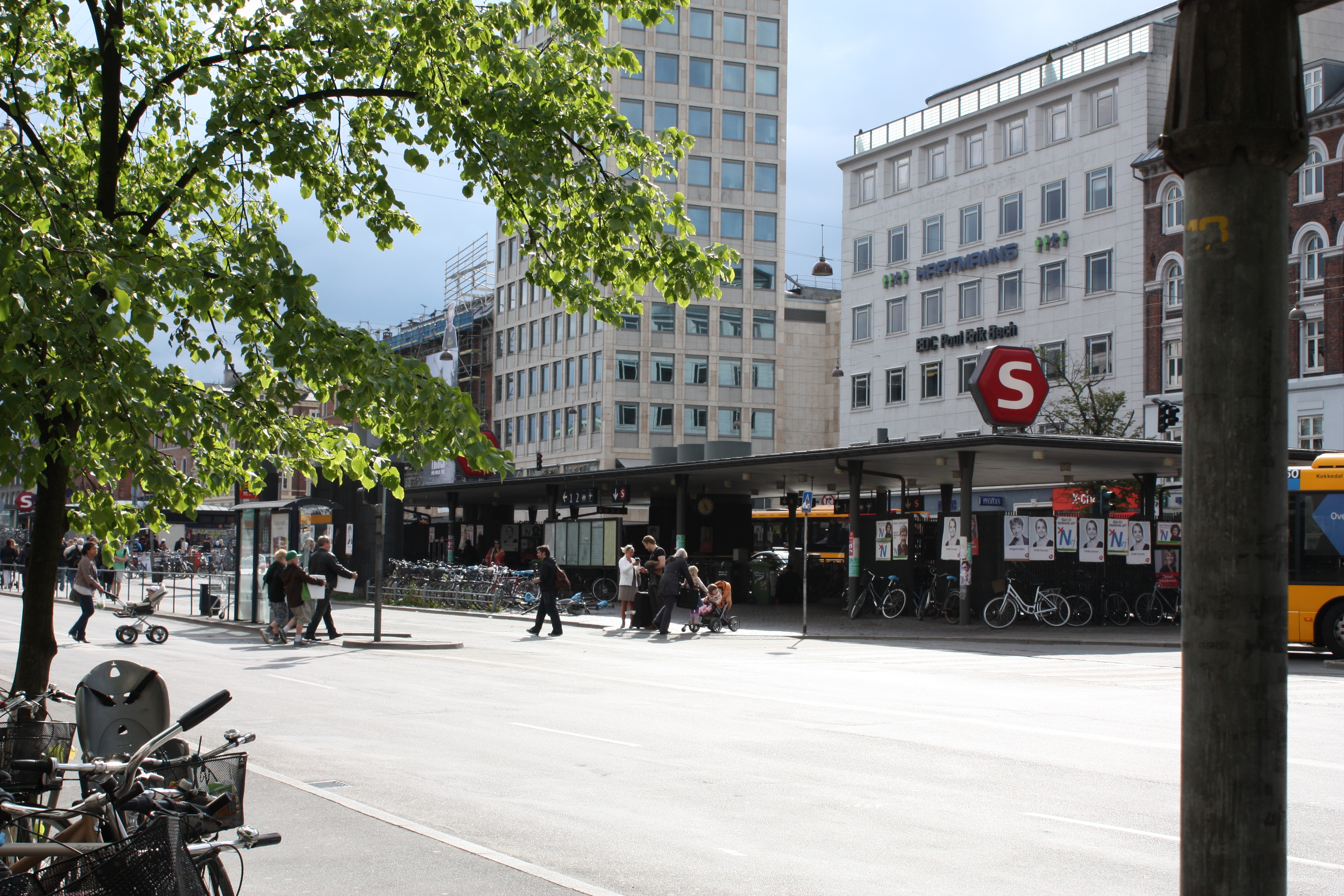 Kopenhagen 2009